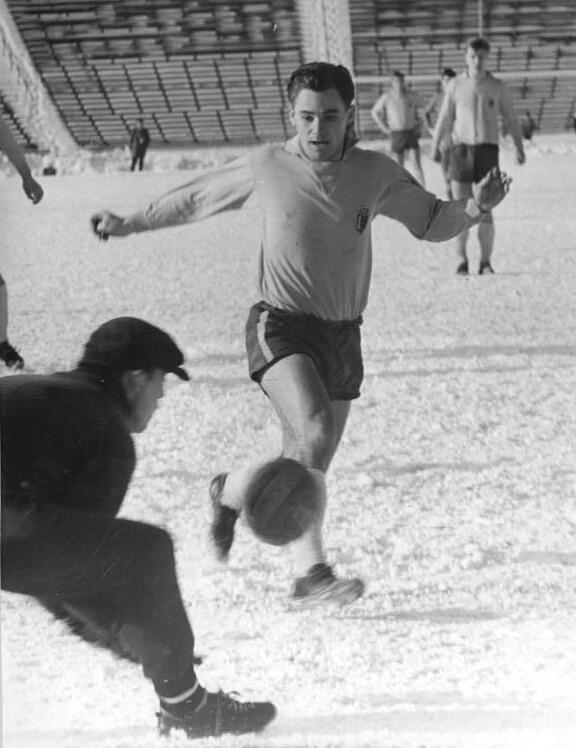 Zentralbild-Kluge tre. 7.3.1965 Fußball-Oberliga - SC Motor Jena unterlag in Leipzig 0:1 - In einem Fußball-Oberligaspiel unterlag der SC Motor Jena am 7.3.1965 im Leipziger Zentralstadion dem SC Leipzig vor 18.000 Zuschauern mit 0:1. UBz.: Torsteher Heinzel (Jean) klärt mit letztem Einsatz vor dem anstürmenden Mittelstürmer Frenzel (Leipzig).